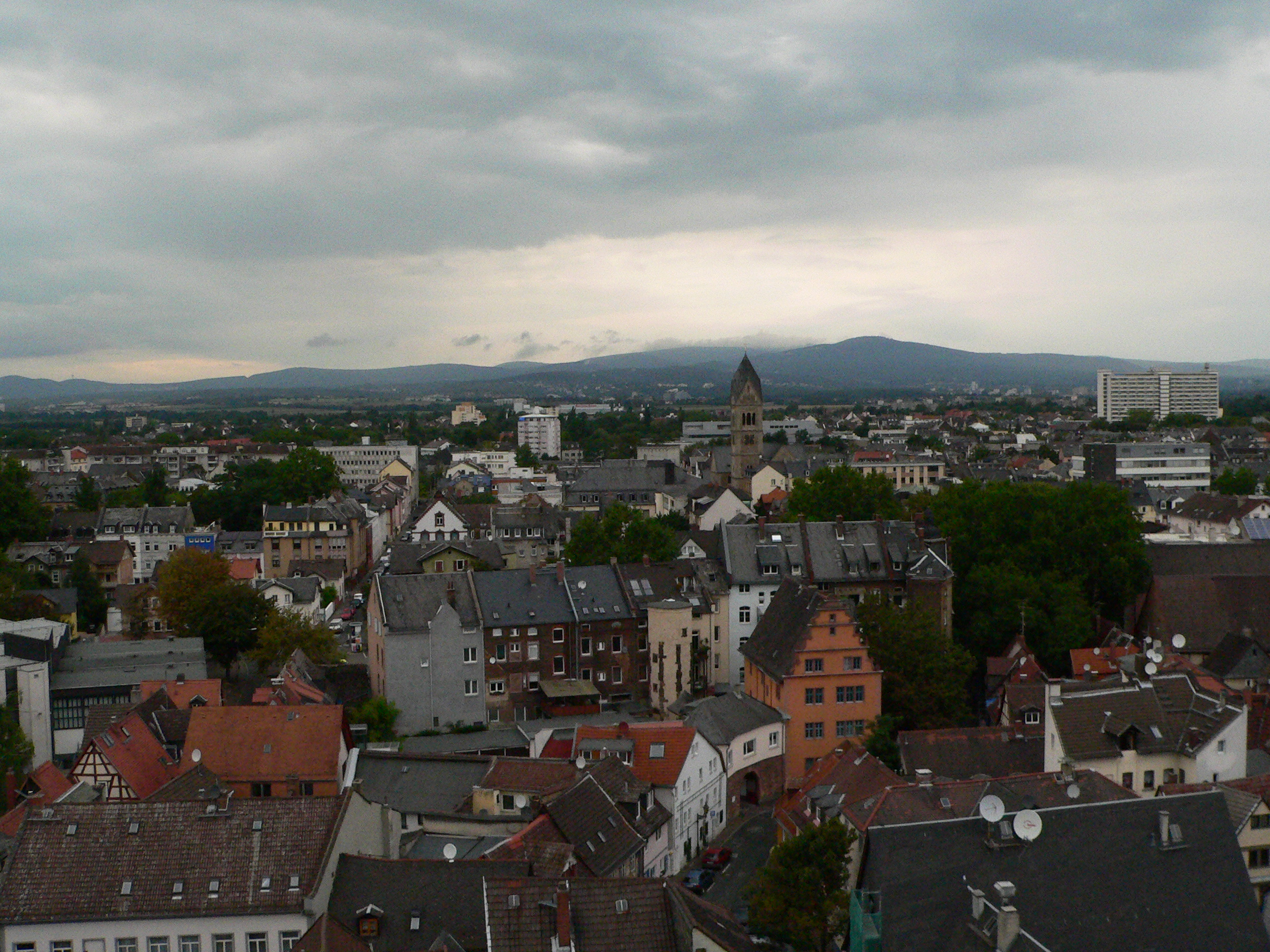 Höchster Panorama